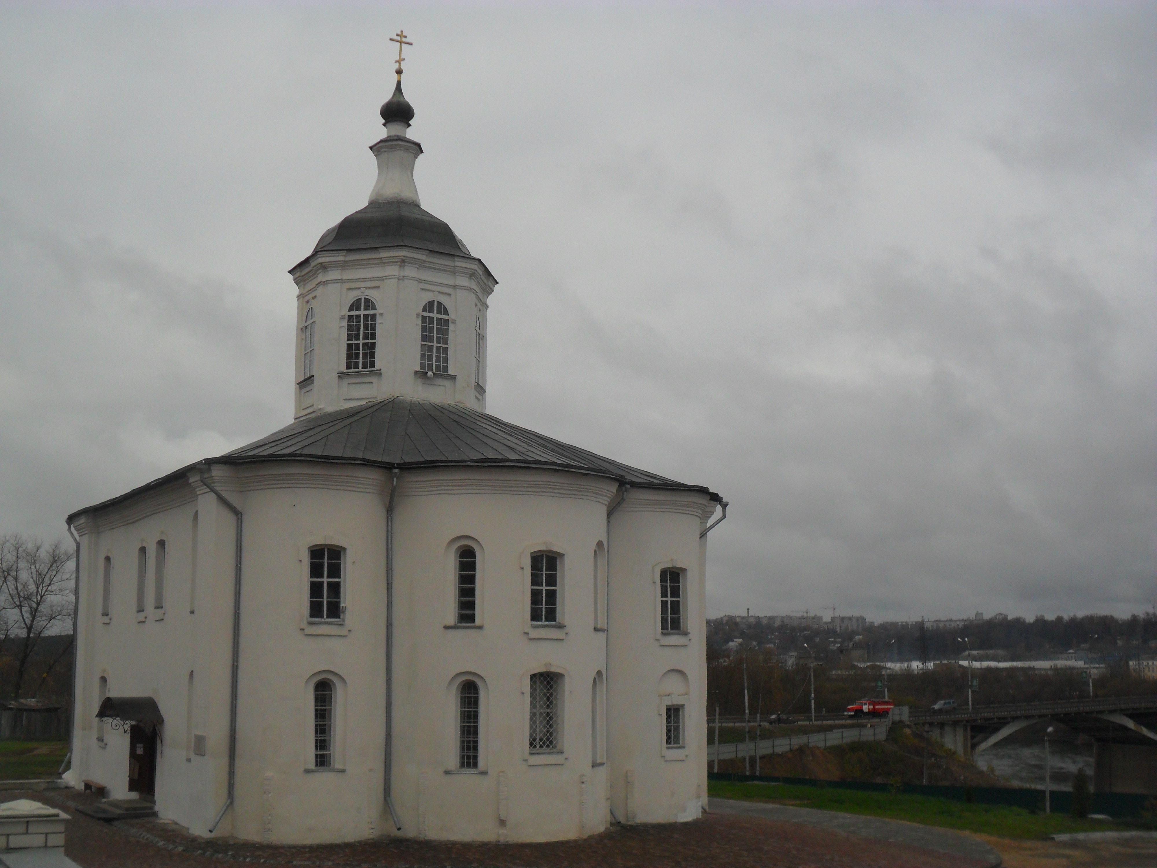 Церковь Иоанна Богослова.